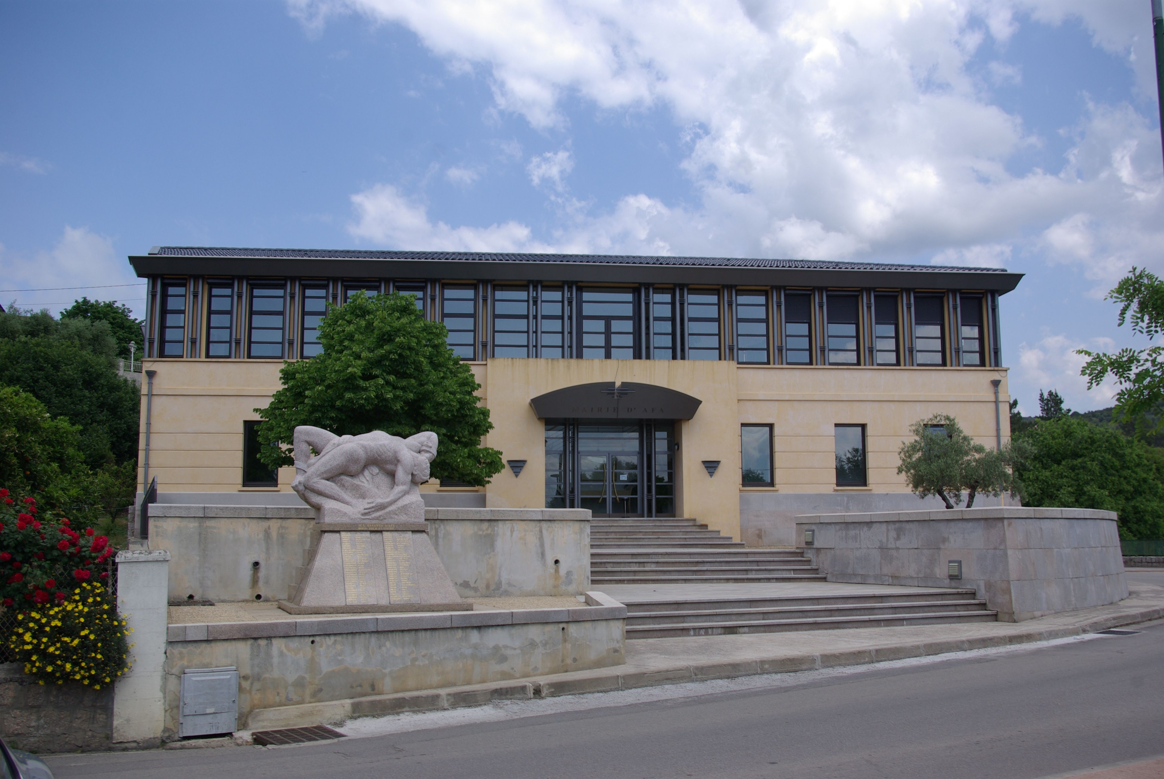 Afa auf Korsika in Frankreich. Das Rathaus in Afa im Ortskern in der Nähe der Kirche.